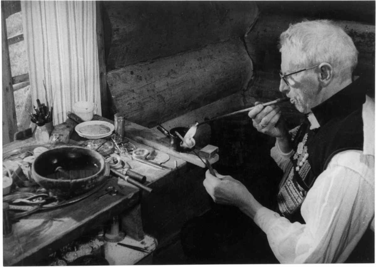 Sølvsmeden Knut Helle i Valle fotografert i 1959 i arbeid med blåserør og lodding på sølje. Foto Kyrre Grepp / Norsk Folkemuseum.